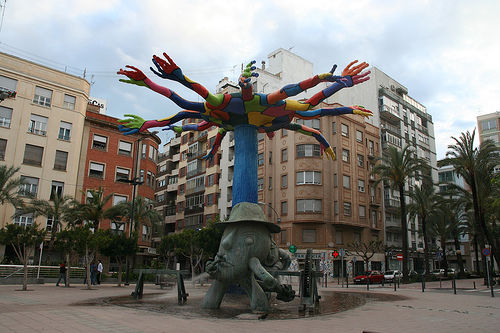 Fuente en la Plaza Huerto Sogueros de Castellón de la Plana (España)